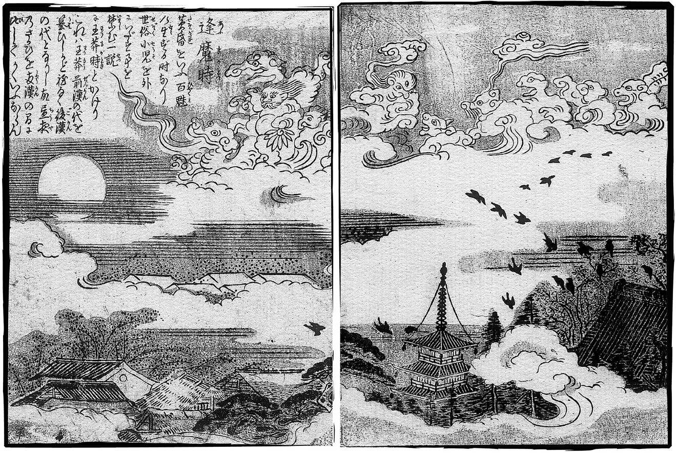 Ōmagatoki (逢魔時, evening) from the Konjaku Gazu Zoku Hyakki (今昔画図続百鬼)